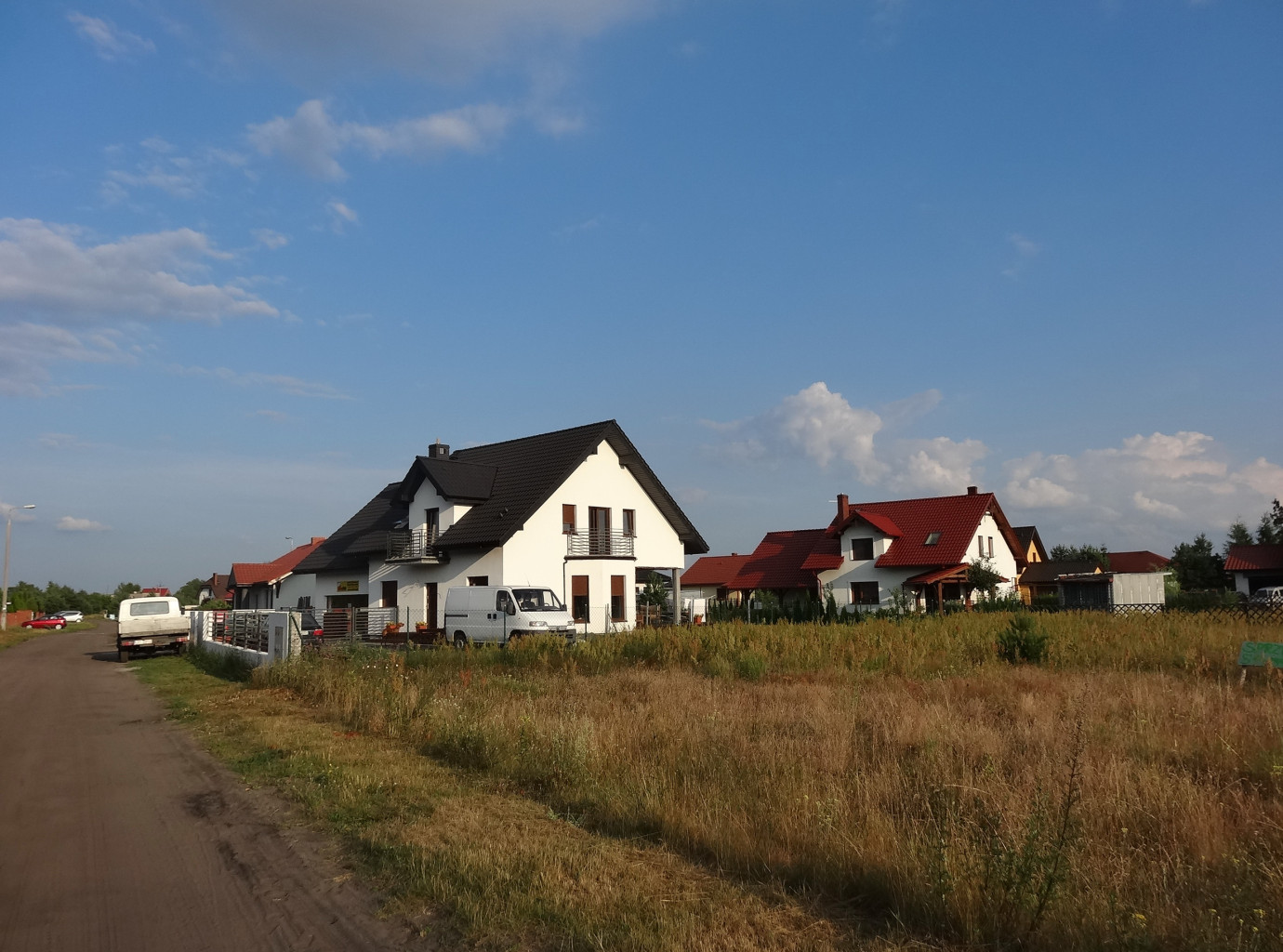 Zabudowa w miejscowości Murowaniec, gmina Białe Błota, powiat bydgoski, województwo kujawsko-pomorskie